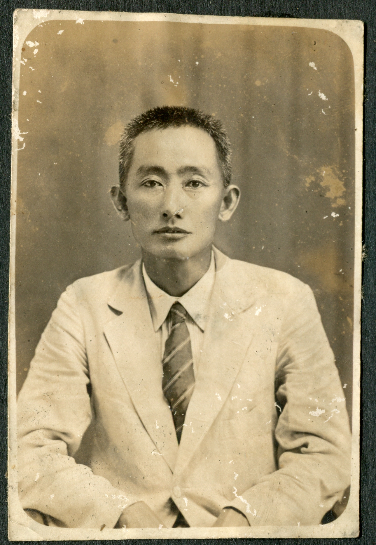 中文（台灣）: 張禎祥身著西裝拍攝之半身沙龍照，大約攝於1930年